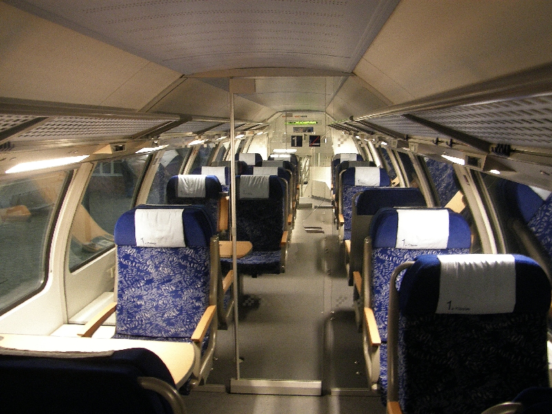 Die 1. Klasse im Metronom